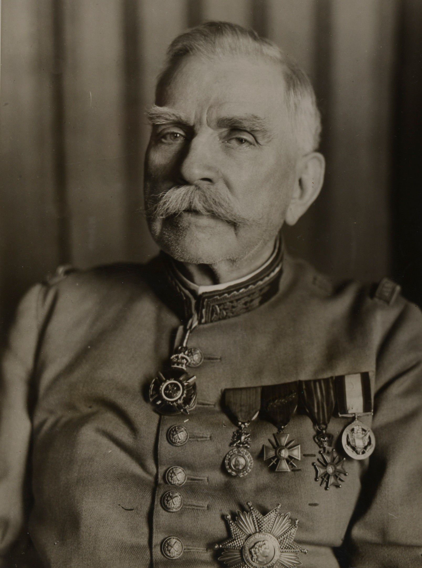 Le maréchal Joseph Joffre.